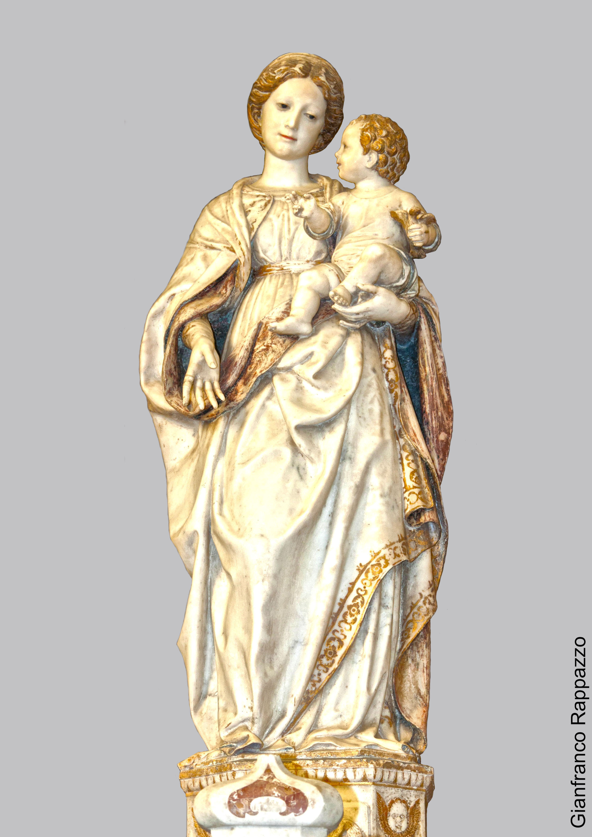 Statua Madonna della Neve, Gagini, Castello, Santa Lucia del Mela